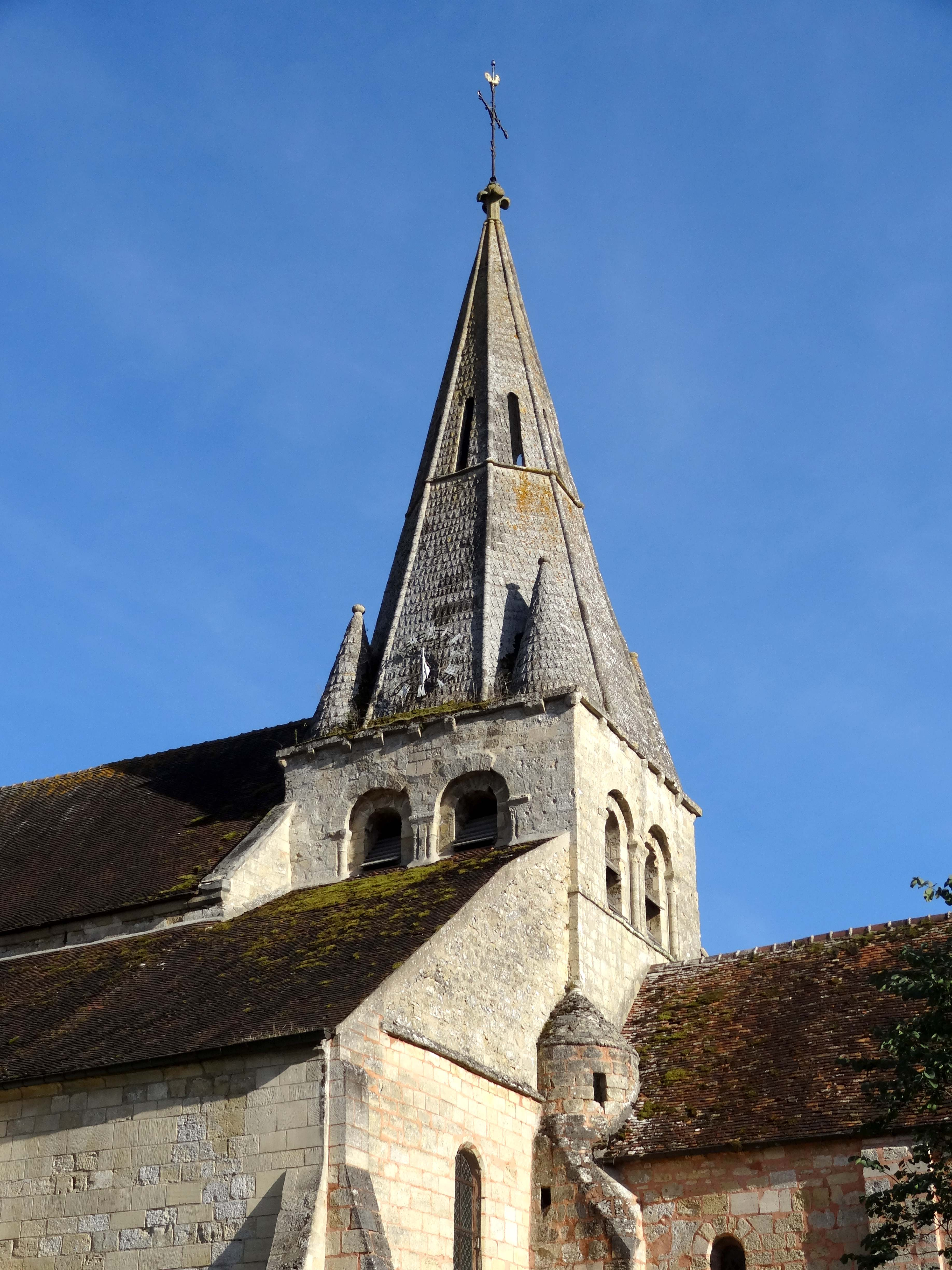 Église Notre-Dame-de-l'Assomption de Gaillon-sur-Montcient - voir titre.